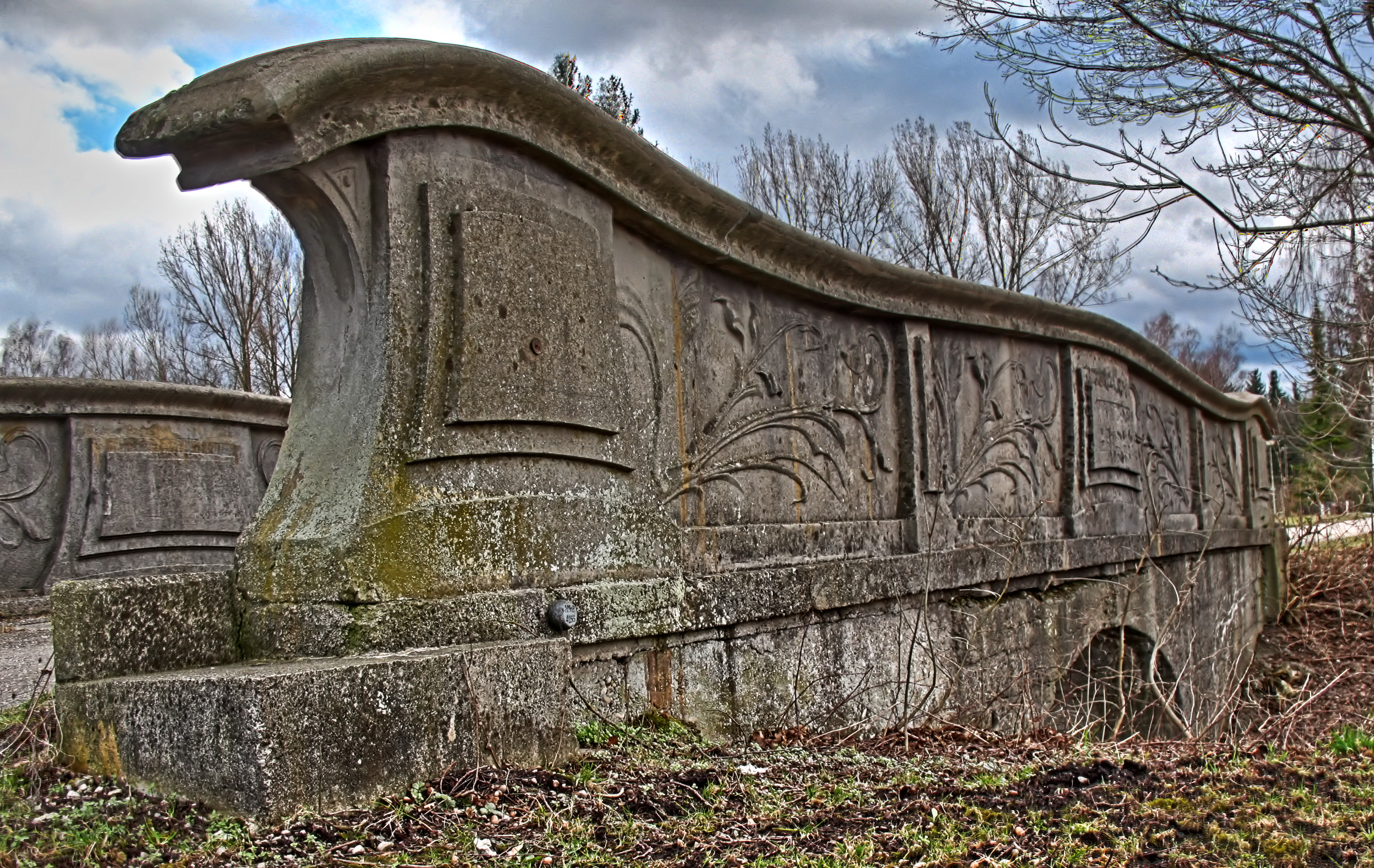 Russenbrücke in Gröbenzell, Baujahr 1916